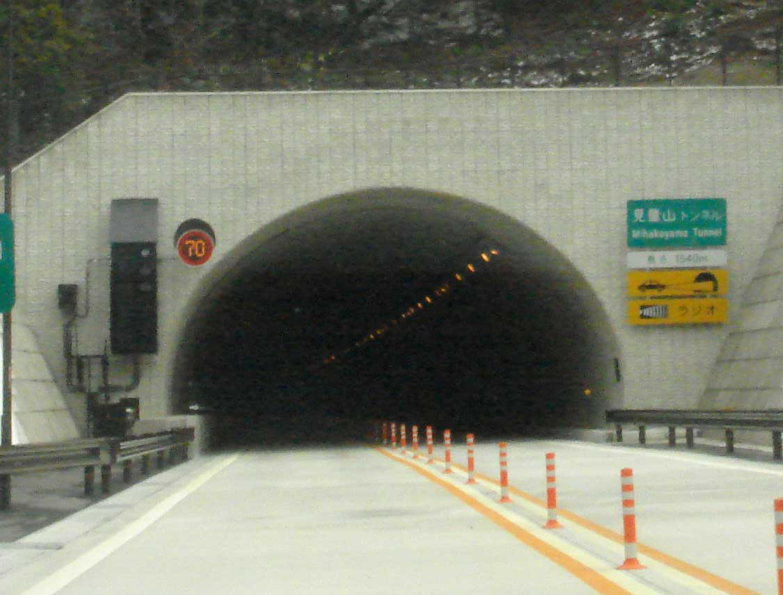 Mihakayama Tunnel at Takayama,Gifu,Japan(見量山トンネル)